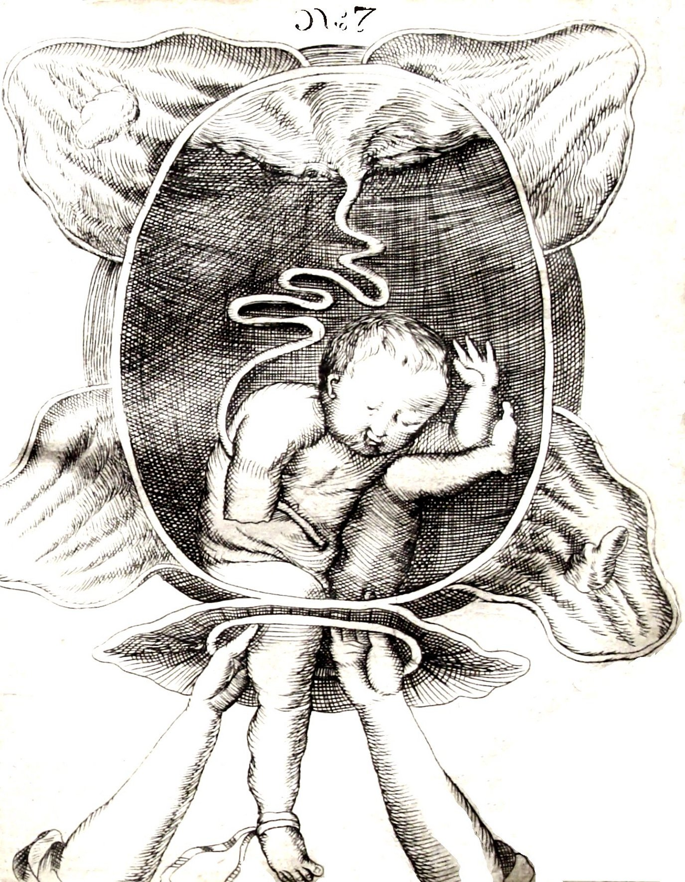 Justina Siegmundin - nieprawidłowy poród, miedzioryt z 1690 r.